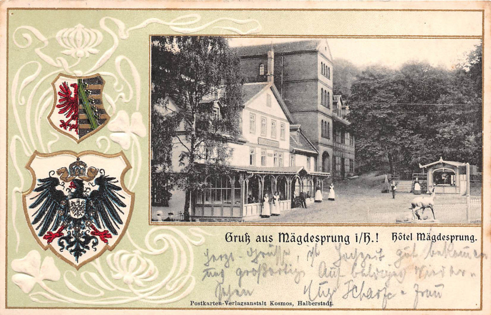 Gruß aus Mägdesprung. Hotel Mägdesprung